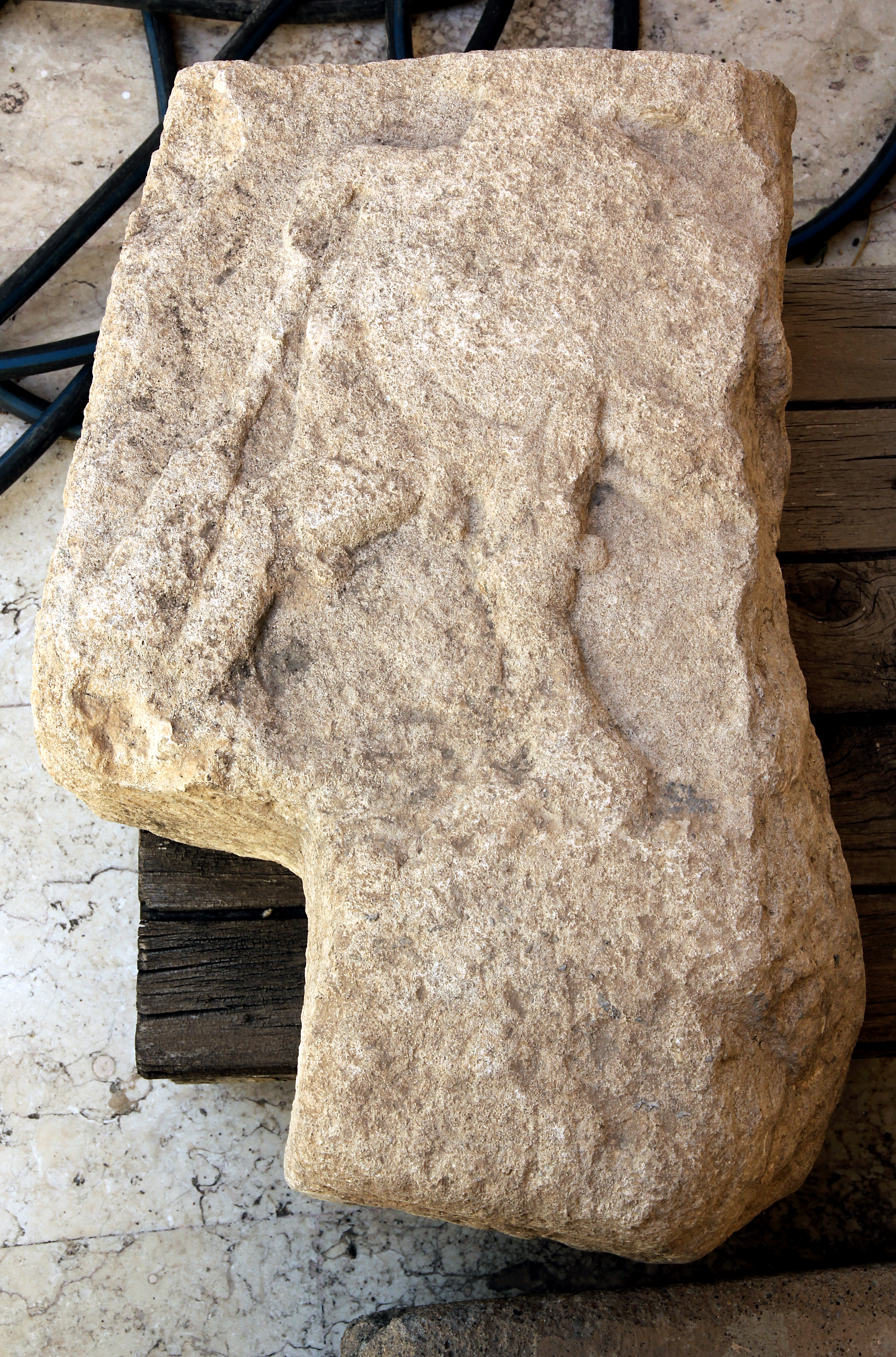 Stele Adıyaman 1 des hethitischen Wettergottes im Archäologischen Museum Adıyaman, Türkei, Unterteil Vorderseite